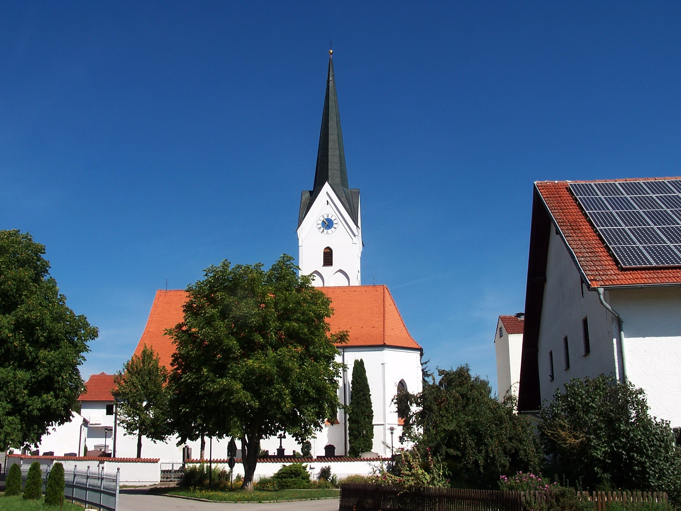 Pfaffendorf 23. Kirche Mariä Opferung. Spätgotischer Bau des 15. Jh., 1718 barockisiert, 1739 südliches Seitenschiff, Sakristei und Westempore errichtet; mit Ausstattung; Seelenkapelle, 18. Jh.; mit Ausstattung; im Friedhof.